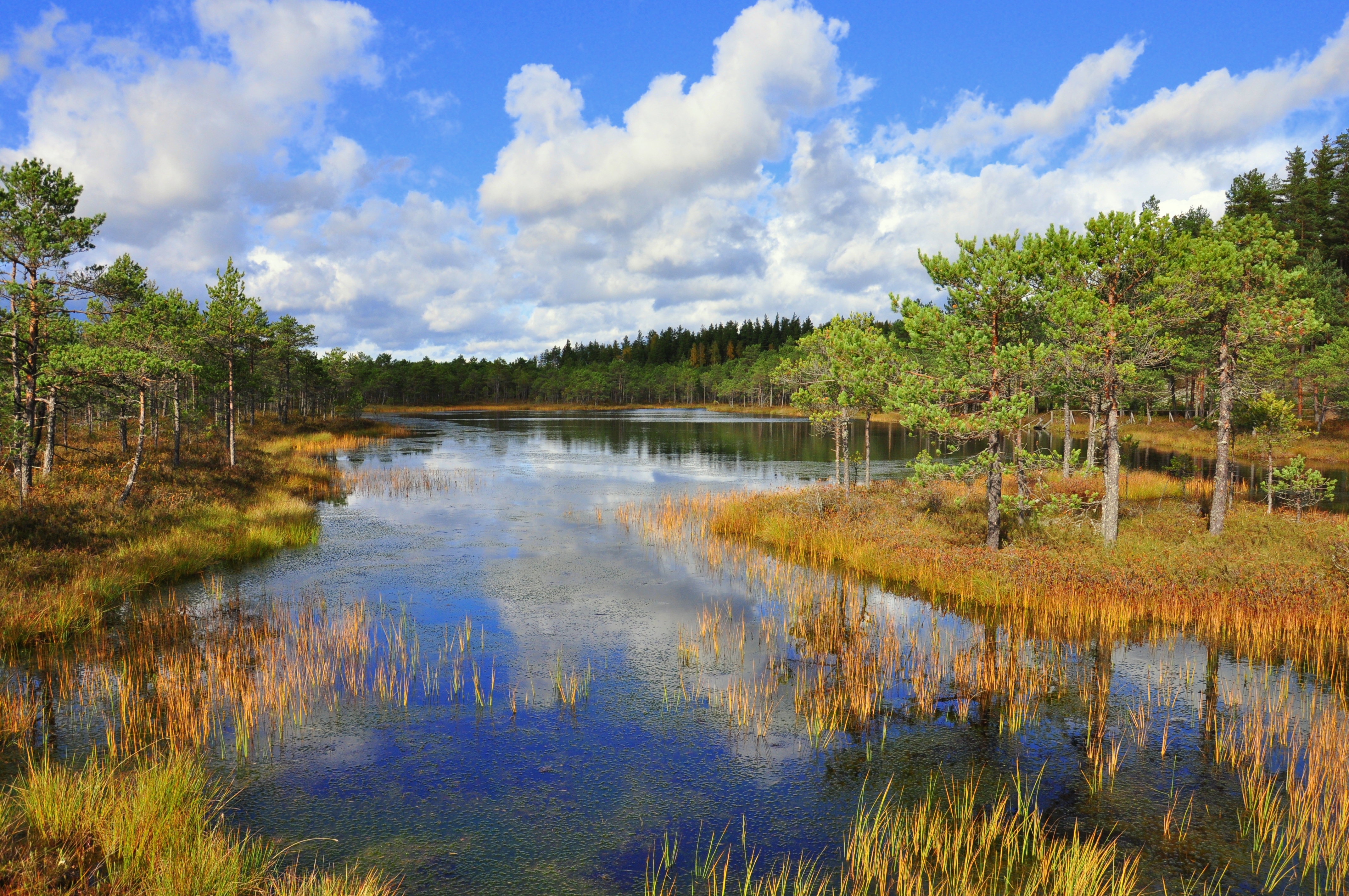 Kaunis rabajärv Meenikunnos